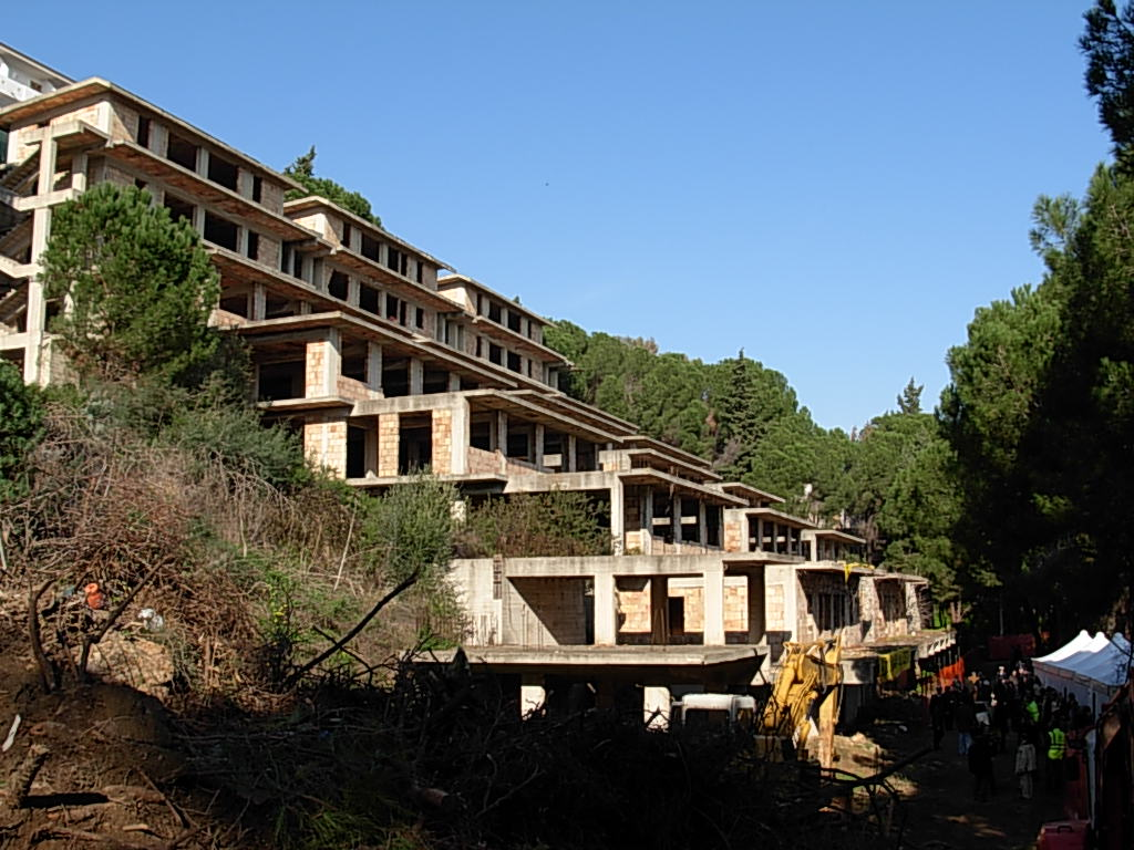 ecomostro Copanello